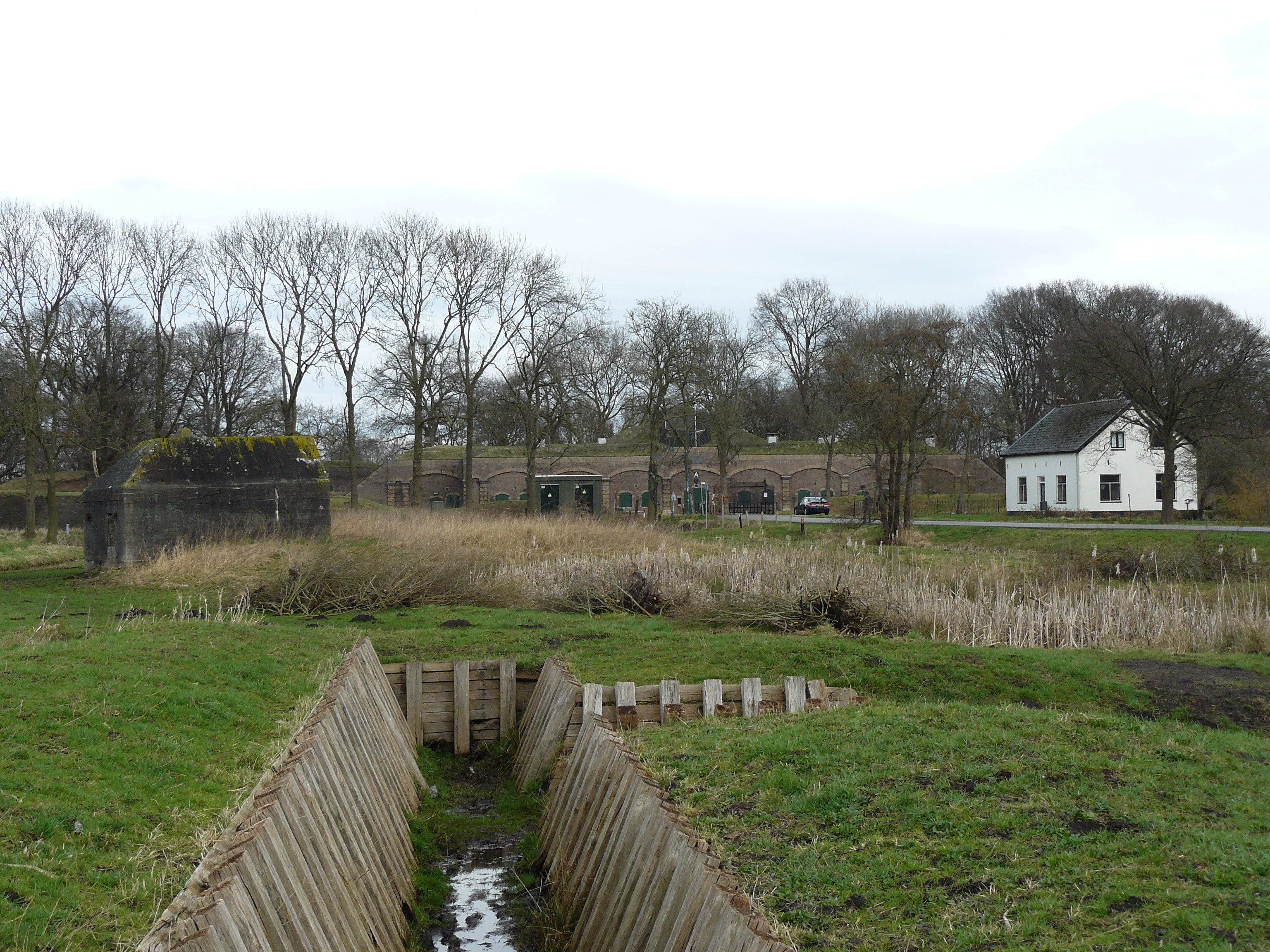 Een deel van de loopgraaf met op de achtergrond, van links naar rechts, een groepsschuilplaats type p, het bomvrije wachtgebouw met brug en de fortwachterswoning.